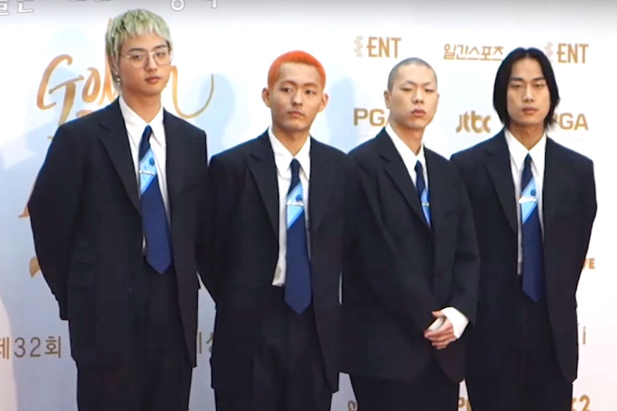 180110 제 32회 골든디스크